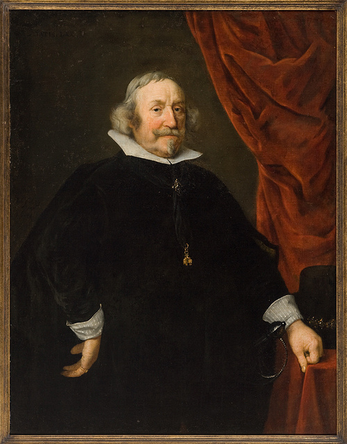 Wolfgang Wilhelm von Pfalz-Neuburg, Herzog von Jülich-Berg (1578-1653)